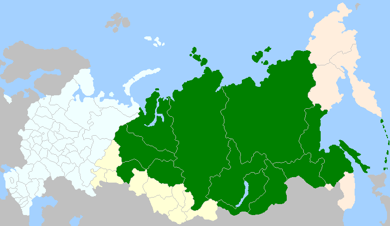 régions administratives occupées en 2008 par les Evenks en Russie.